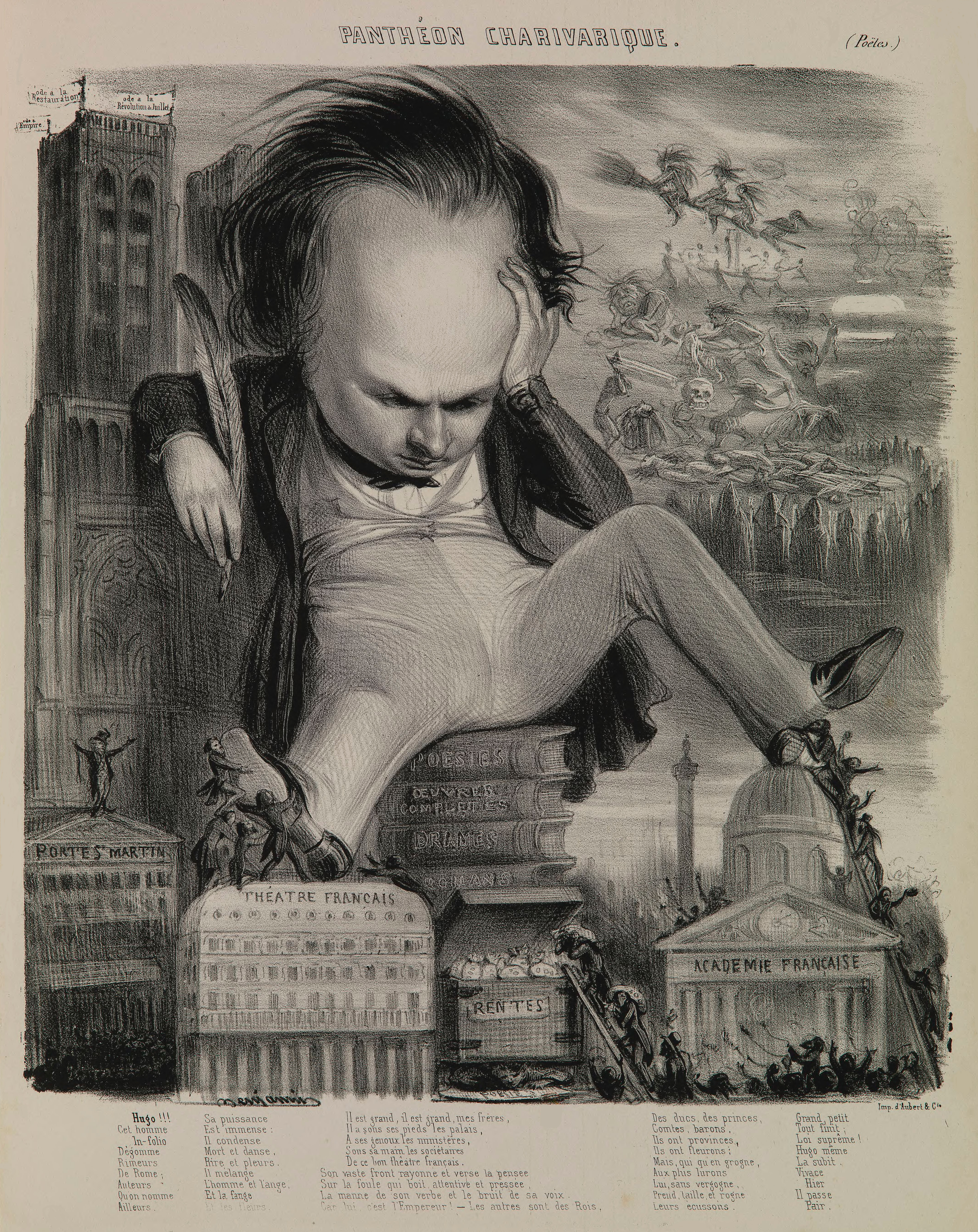 Panthéon charivarique. Caricature de Victor Hugo par Benjamin Roubaud, publiée dans Le Charivari, 9 décembre 1841.